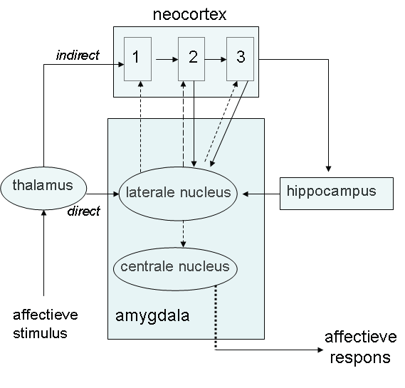 Neuroaffectief model van Le Doux met directe en indirecte circuits naar de amygdala. Neocortex: 1=primair, 2=secundair unimodaal, 3=secundair polymodaal. Het twee routes model van LeDoux met korte route (direct) en langzame route (indirect).